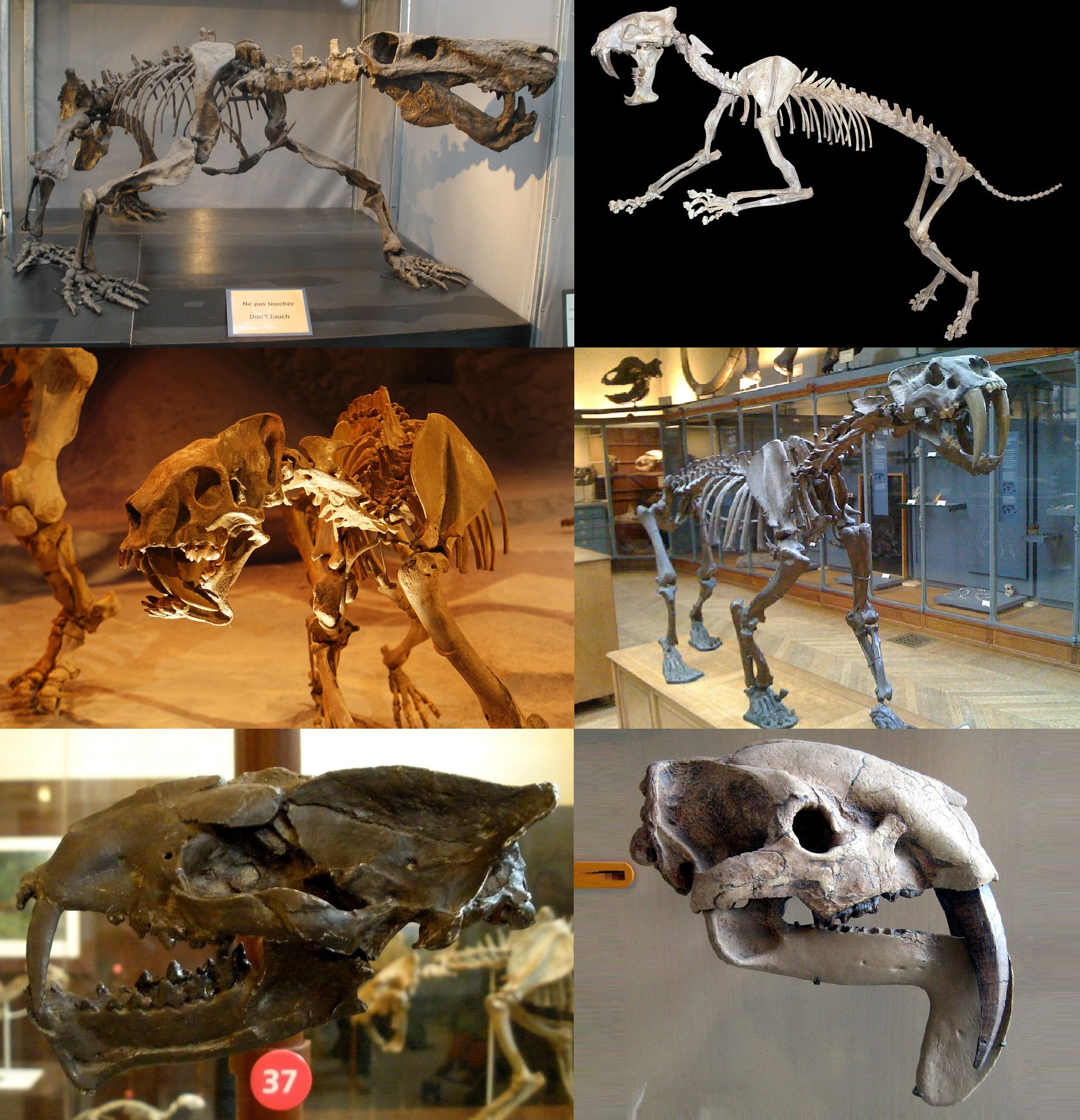 It is a corrected version of File based on